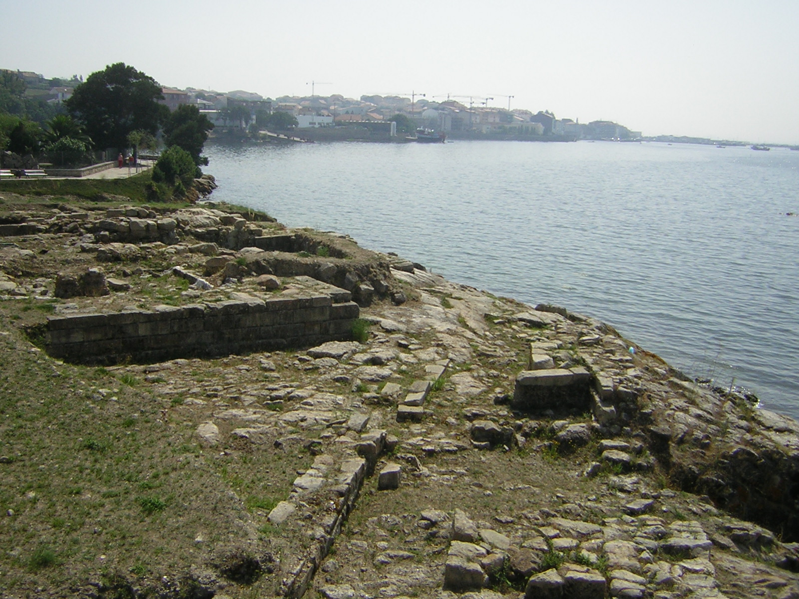 Ruínas do Castelo da Lúa no concello de Rianxo